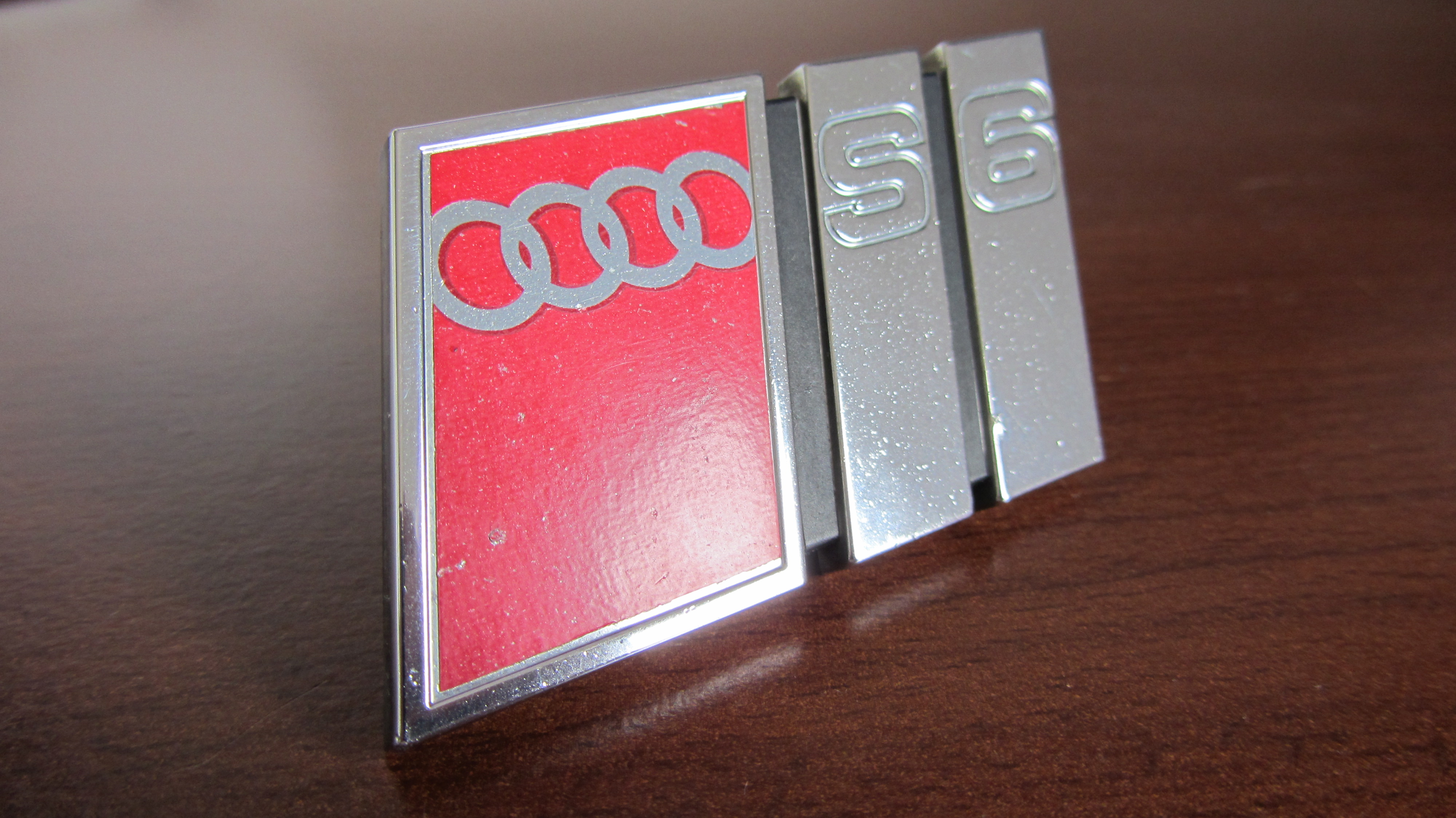 Audi S6 Sportfähnchen bis zur Modellpflege 2001